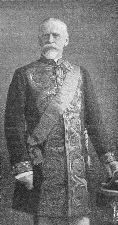 Александр Михайлович Кузминский, судебный деятель, сенатор.